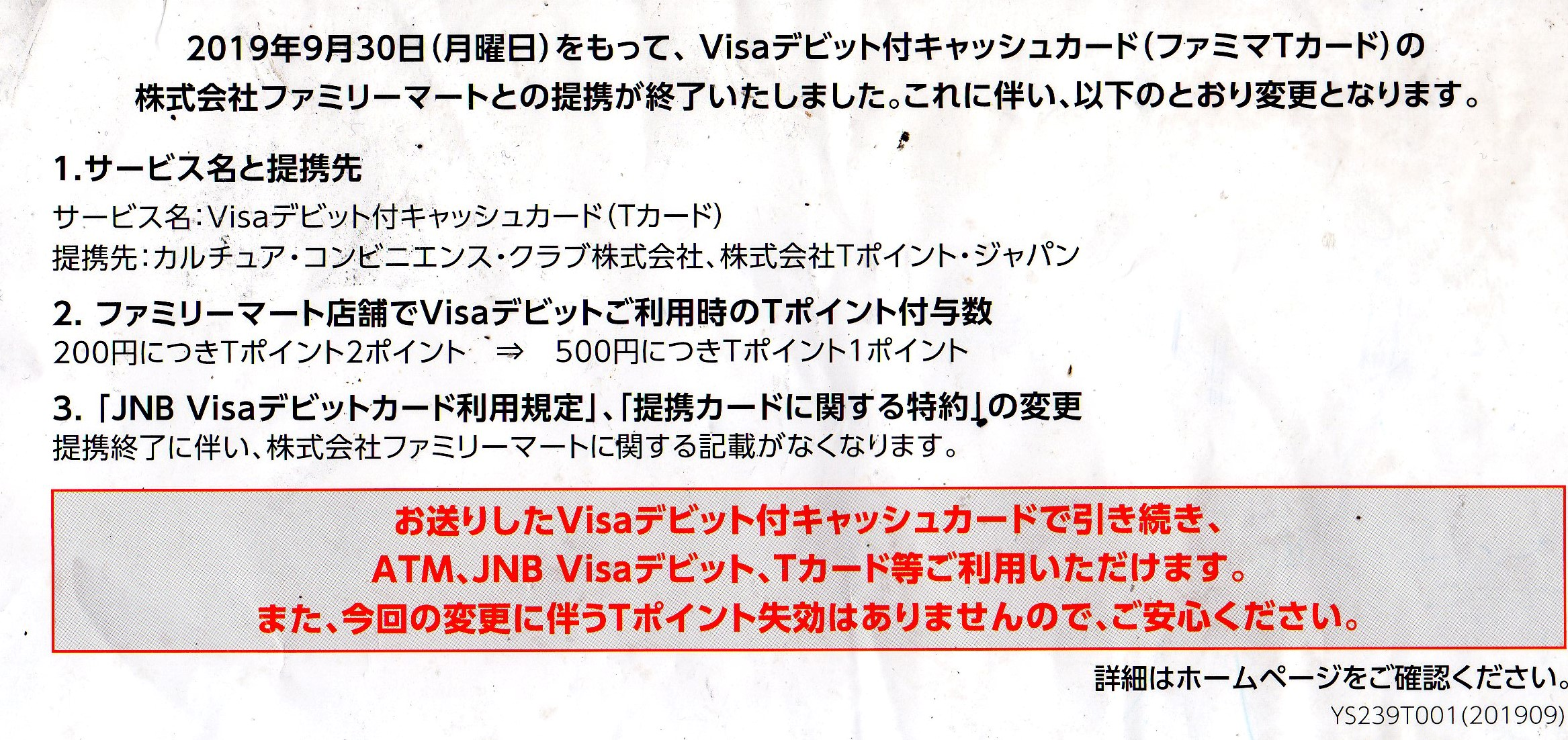 取り扱いの変更